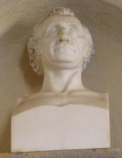 Diese Büste des Künstlers Johann Halbig stellt wahrscheinlich Friedrich August von Gise dar. Sie steht in der Familiengruft in Saltendorf an der Naab.